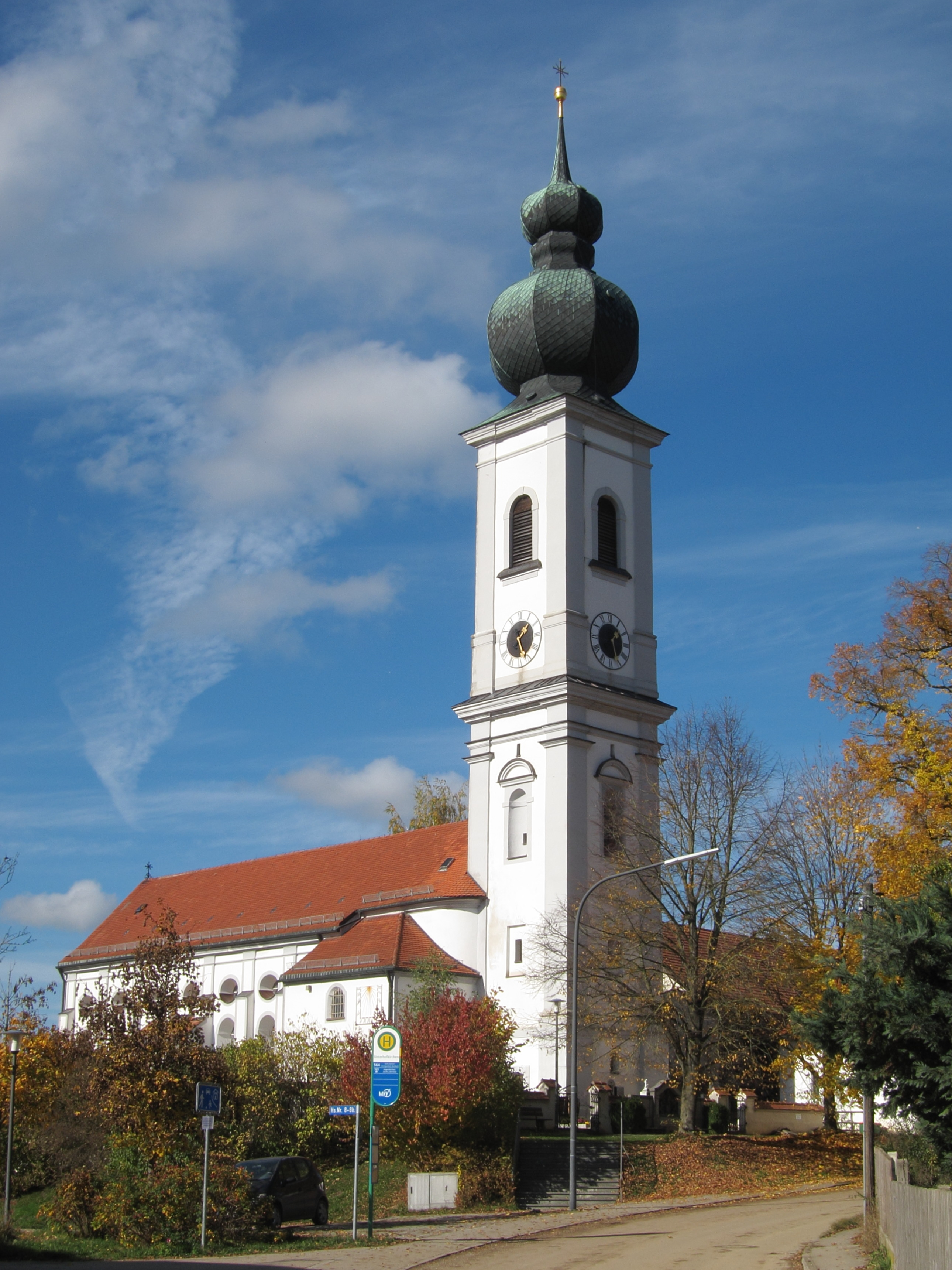 Katholische Pfarrkirche Mariae Geburt; Saalbau mit angefügter Sakristei und Spindelhelmturm, Langhaus im Kern spätgotisch, von Hans Kogler 1698 wesentlich neu gebaut, Verlängerung des Langhauses 1908; mit Ausstattung.